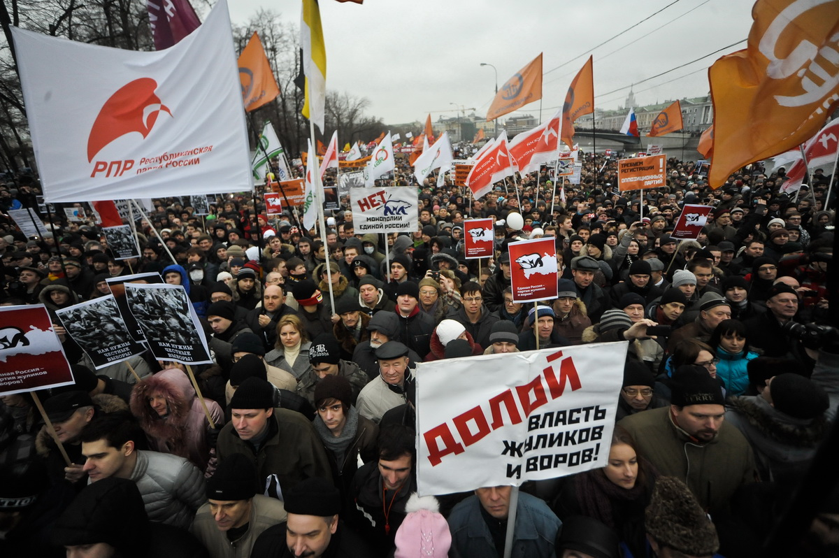 Многотысячный митинг против фальсификаций выборов в Государственную думу РФ на Болотной площади в Москве 10 декабря 2011